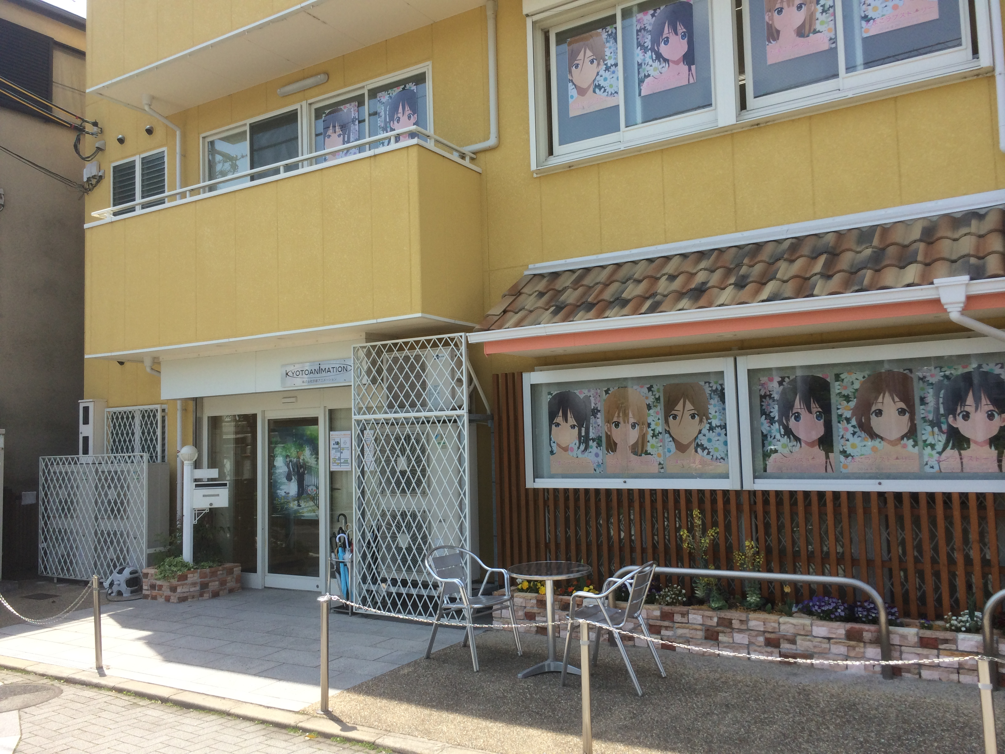 京都動畫總部玻璃窗貼《玉子市場》海報。